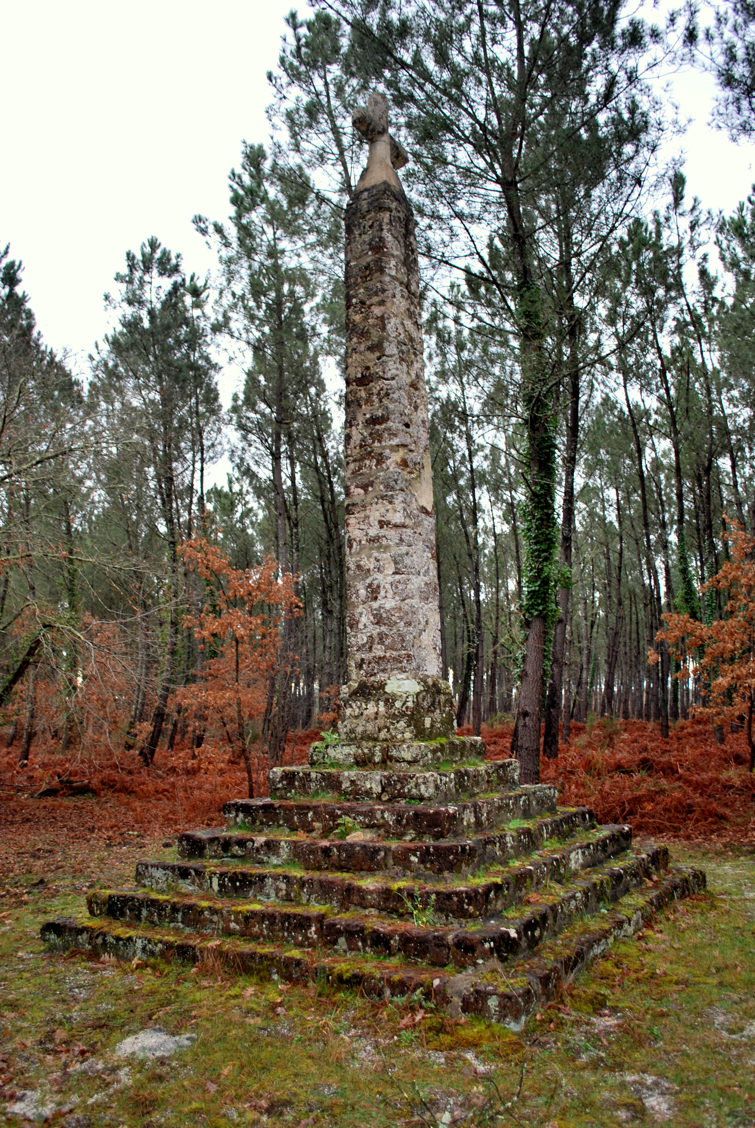 Église Saint-Pierre de Mons de Belin-Bélie